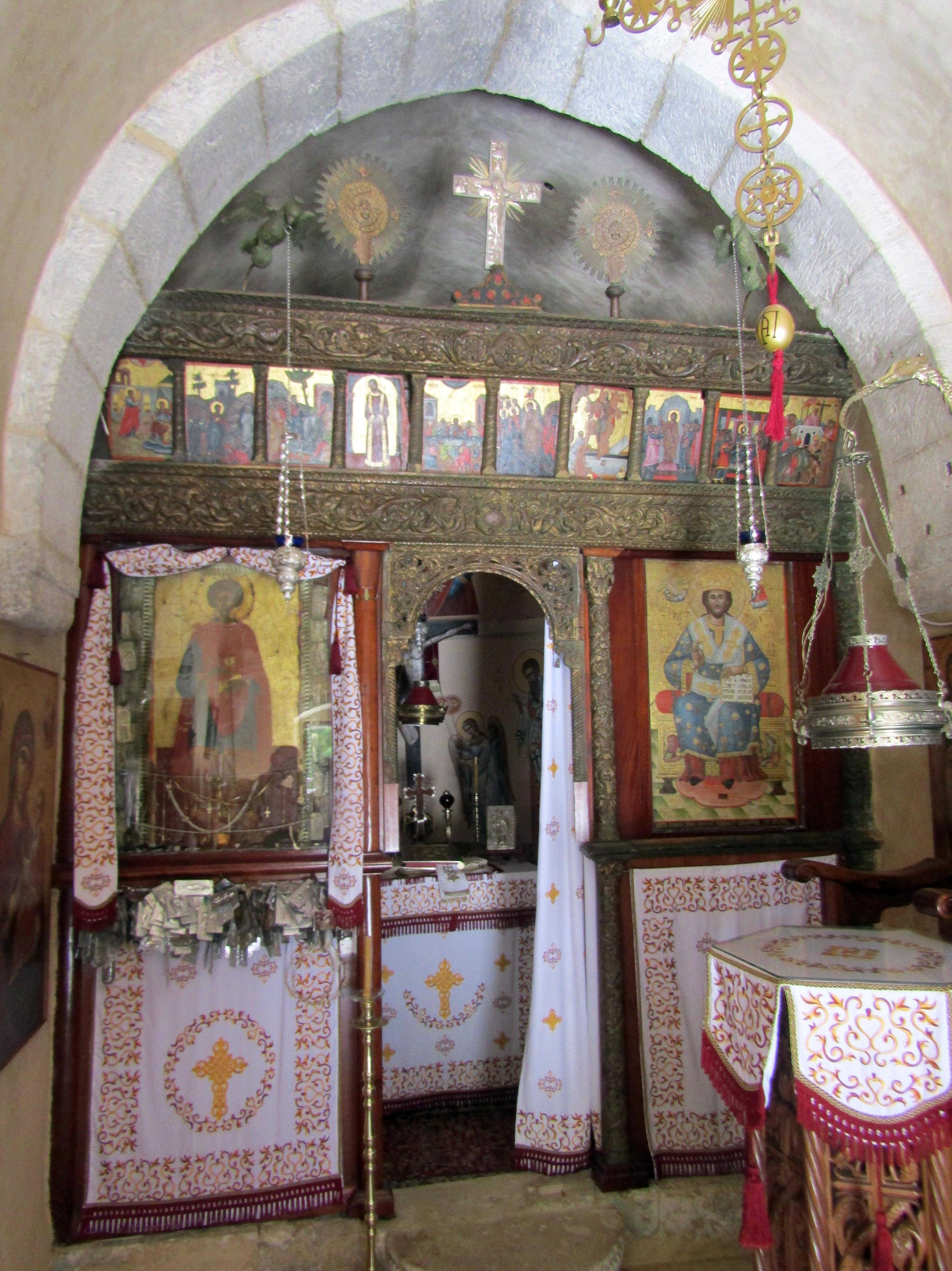 Monastero di San Panteleone (Fodele, Creta): interno della chiesa